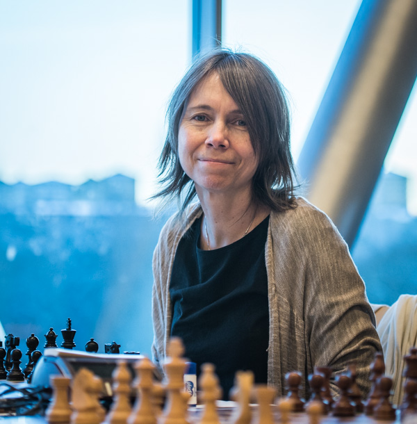 Pia Cramling. Foto: Lars OA Hedlund